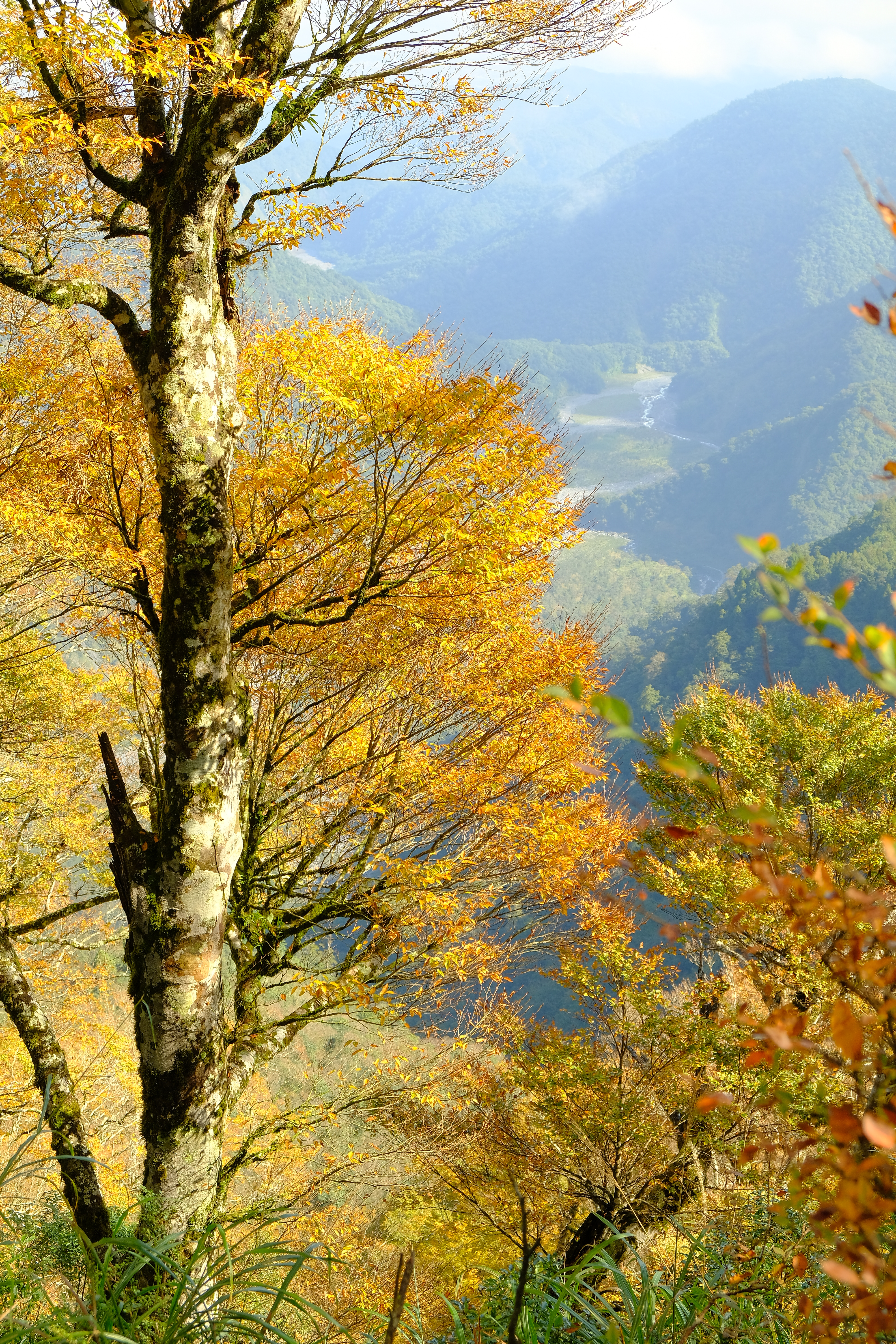 2019 Taiwan Beech Trail at Cueifong Villa台灣山毛櫸步道